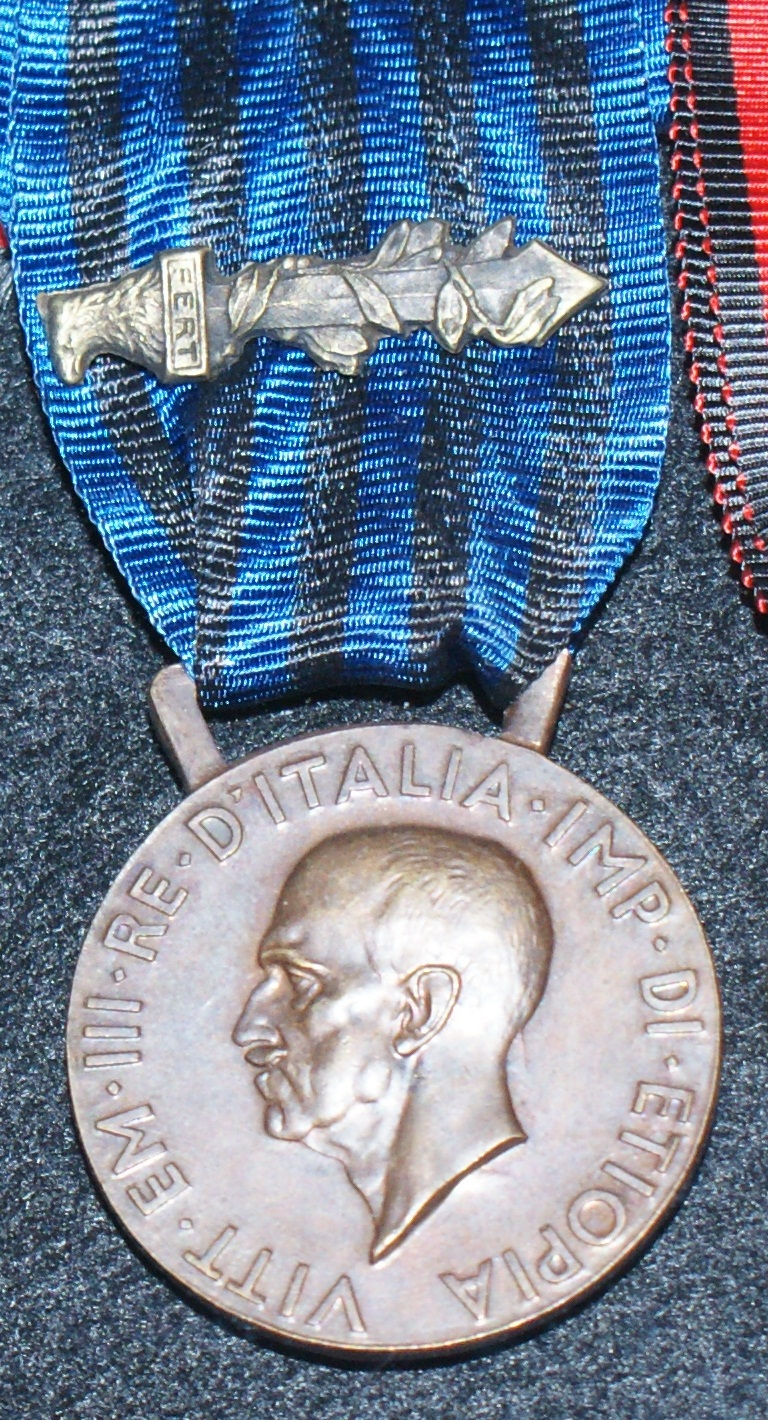 Medaglia commemorativa delle operazioni militari in Africa orientale (ruoli combattenti). Collezione privata